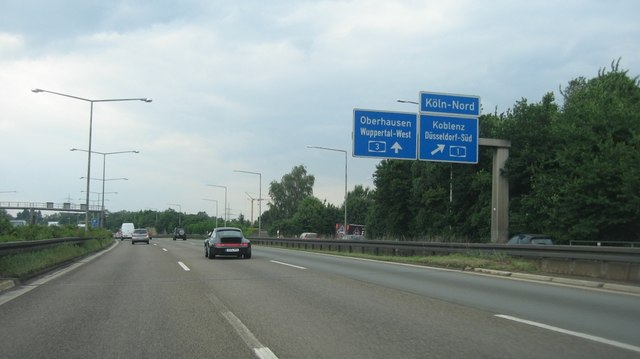 Autobahnkreuz Leverkusen von A 3 und A 1.